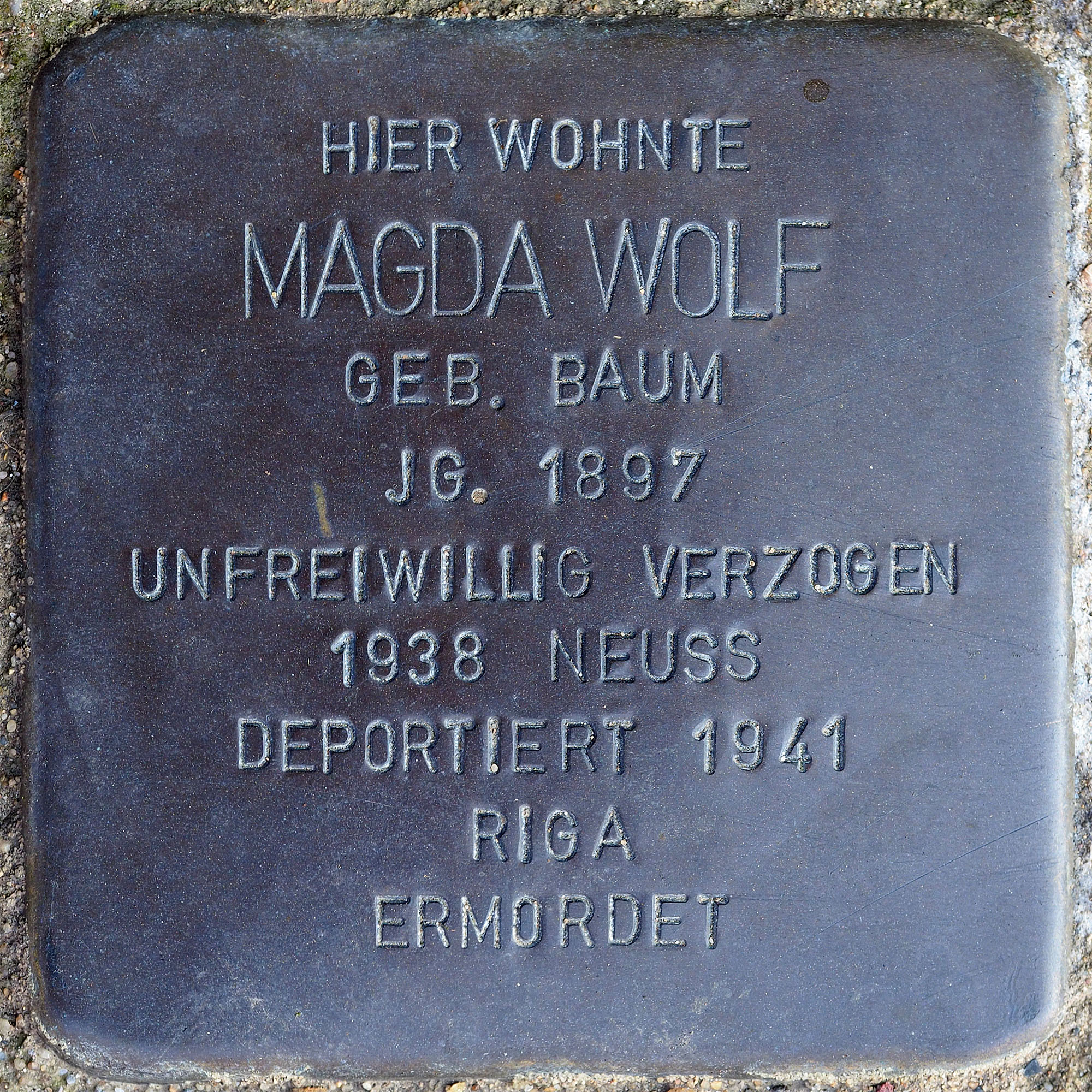 Stolpersteine GV: Wolf, Magda